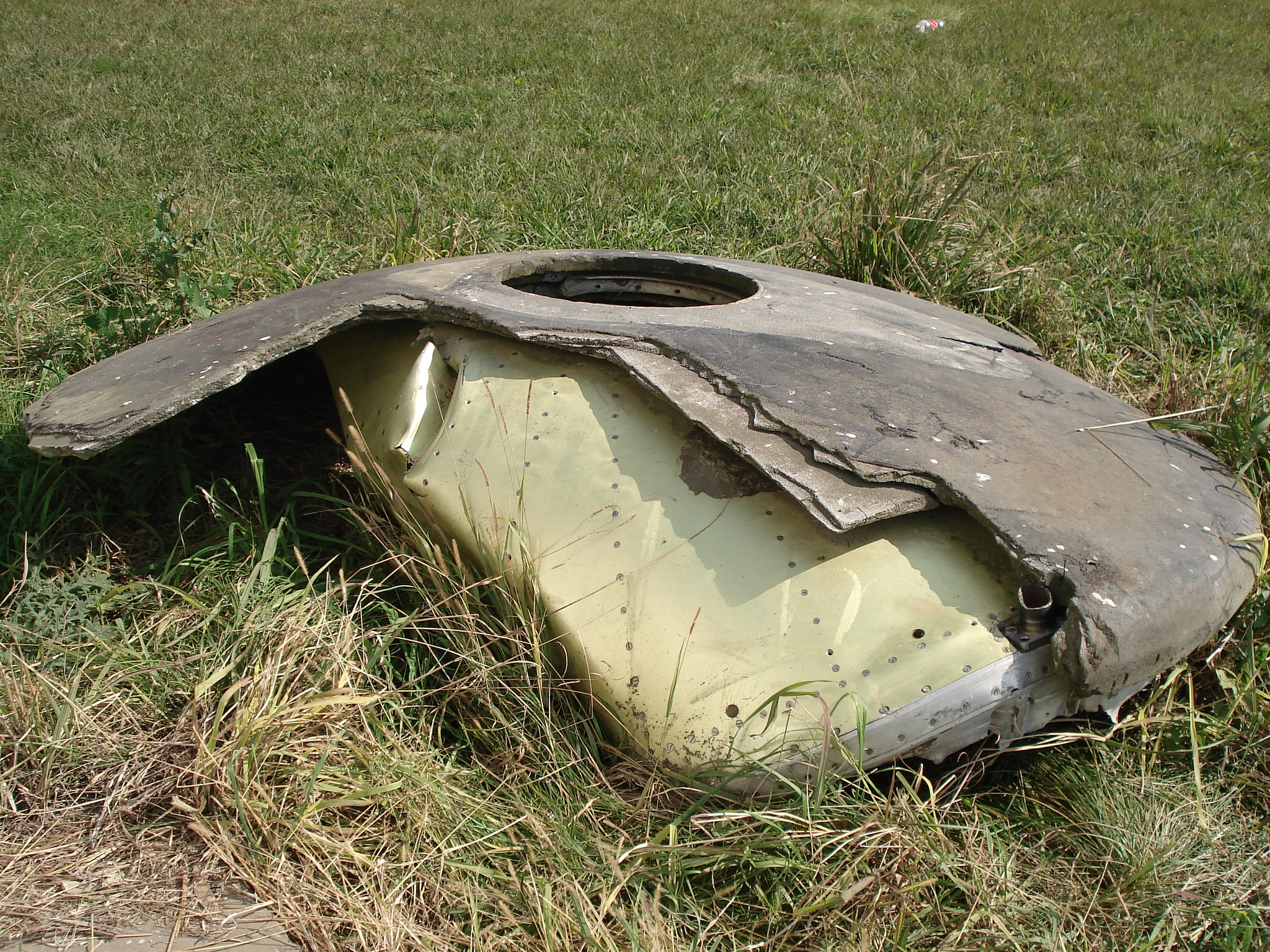 Restos de salyut 7 caídos en Entre Ríos